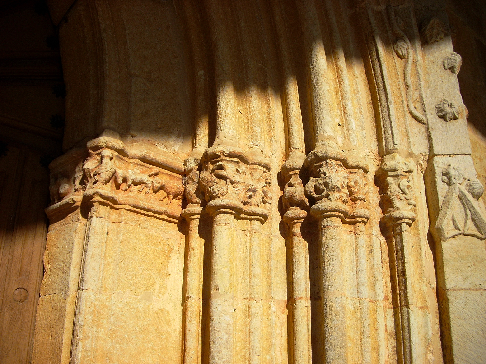 Arquivoltas de la iglesia, Colmenares (Palencia)